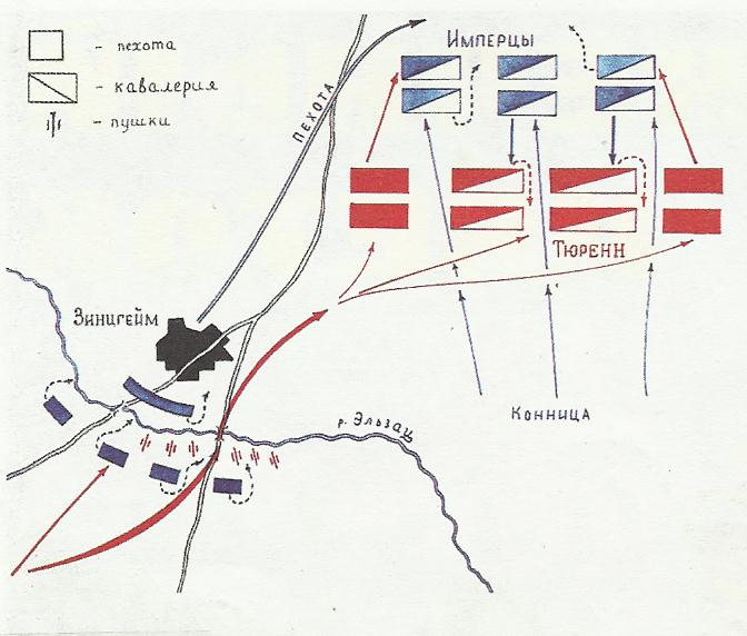 16 июня 1674